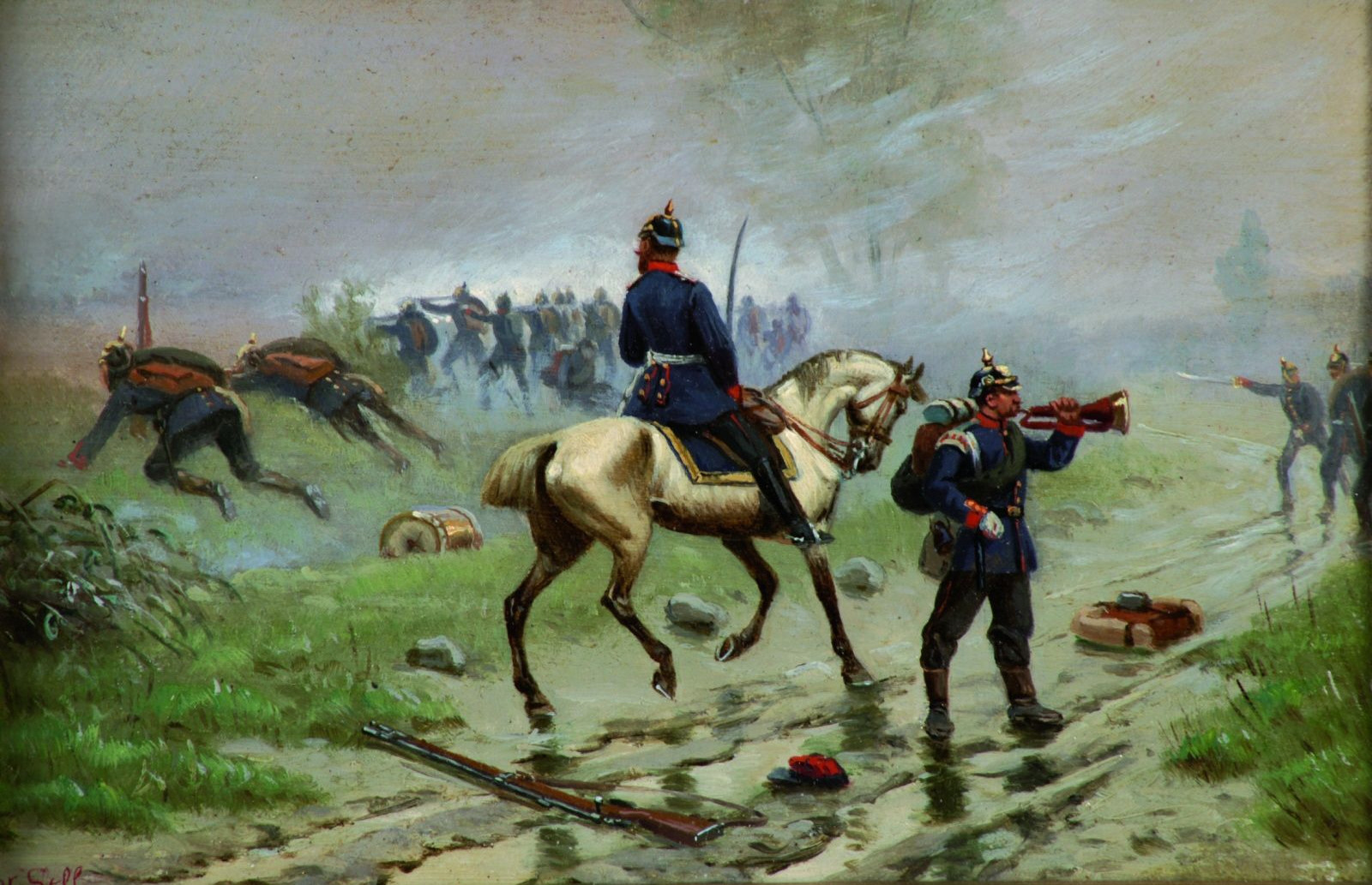 Preußische Soldaten im Gefecht. Öl auf Holz. Signiert. 14 x 21 cm